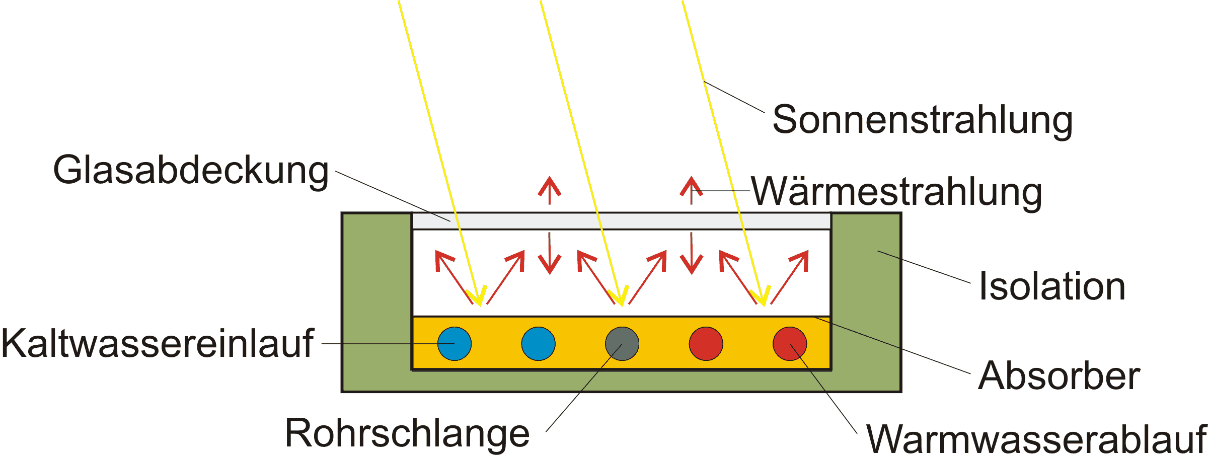 Schema mit Wirkprinzip eines Sonnenlichtkollektors